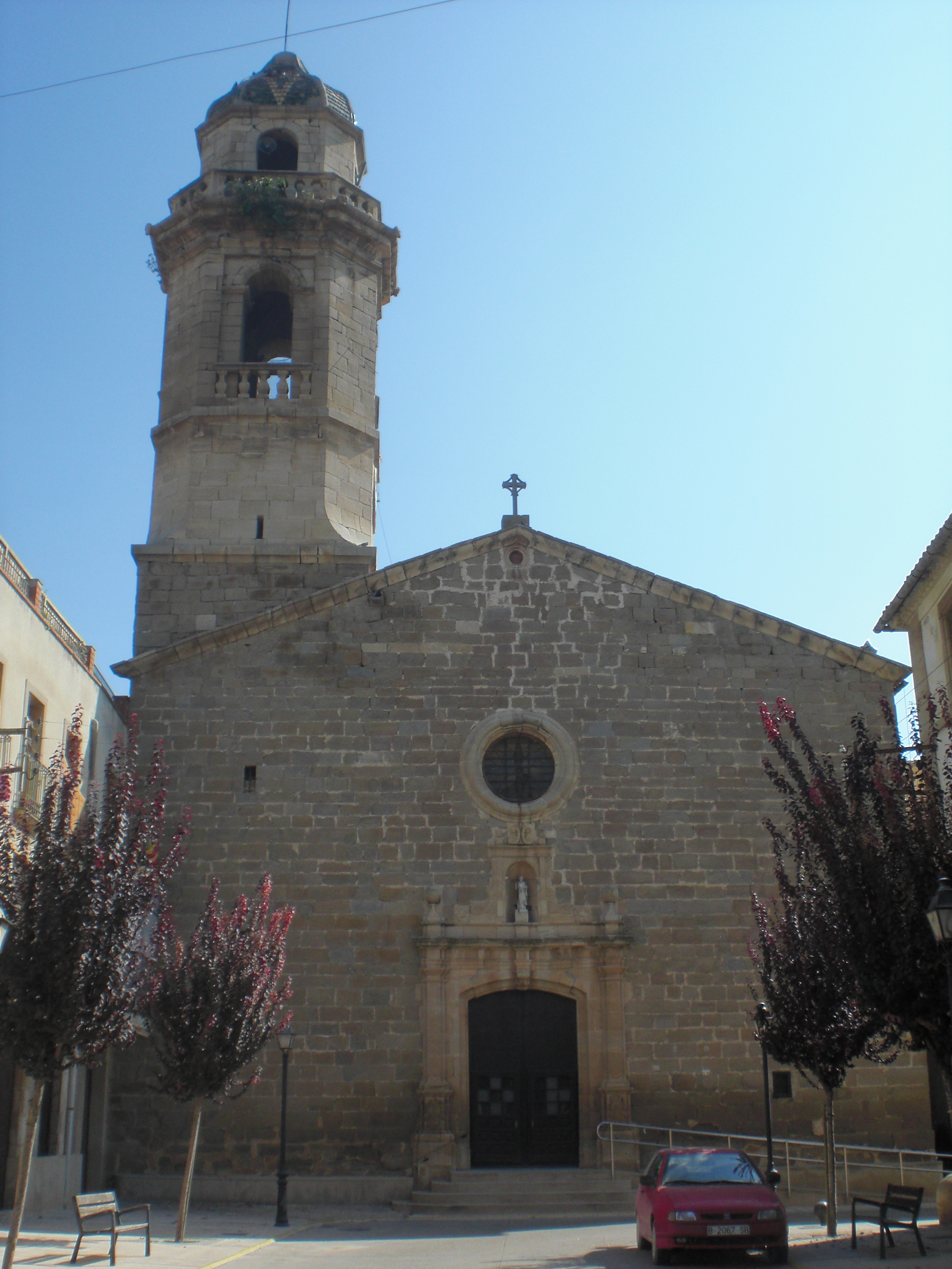 Església parroquial de Sant Andreu (Ivars d'Urgell)